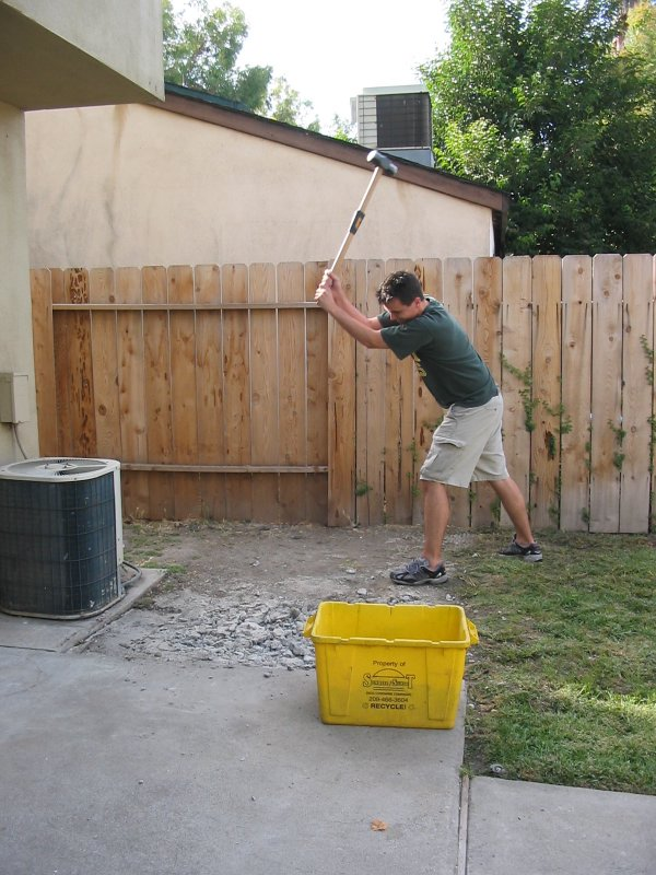 i sledgehammered too